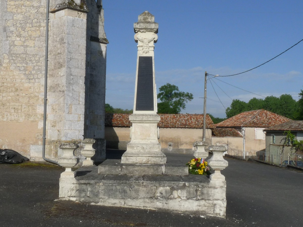 Monument aux morts, St-Bonnet, Charente, France